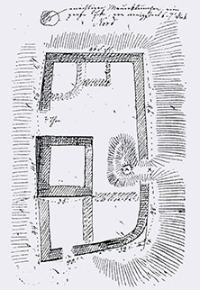 Angerminde castle in 1870